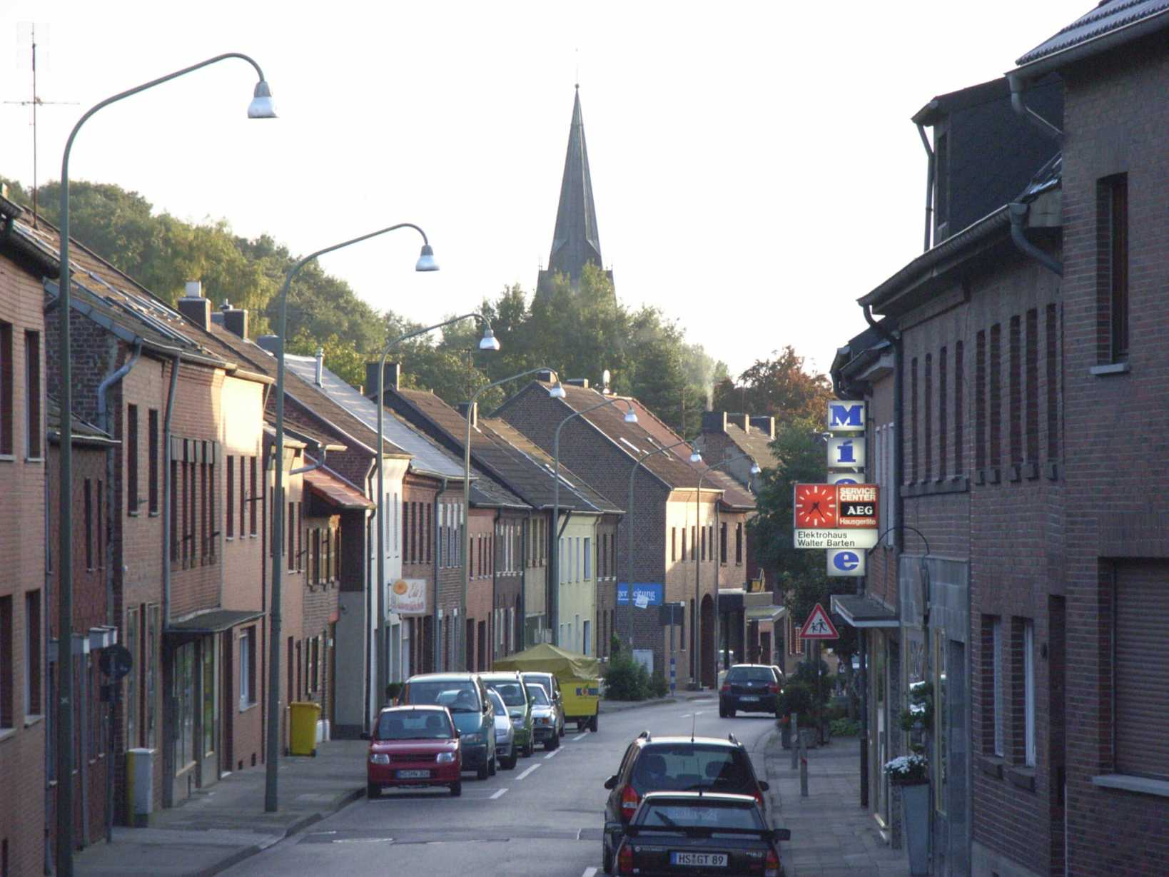 Wassenberg Myhl